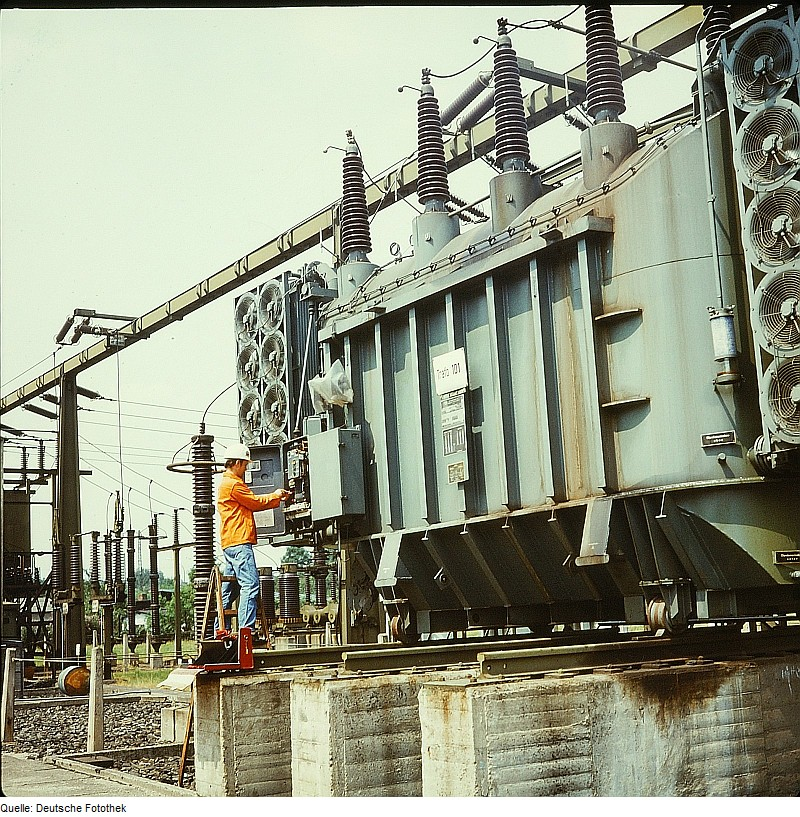 Original image description from the Deutsche Fotothek Elektromonteur